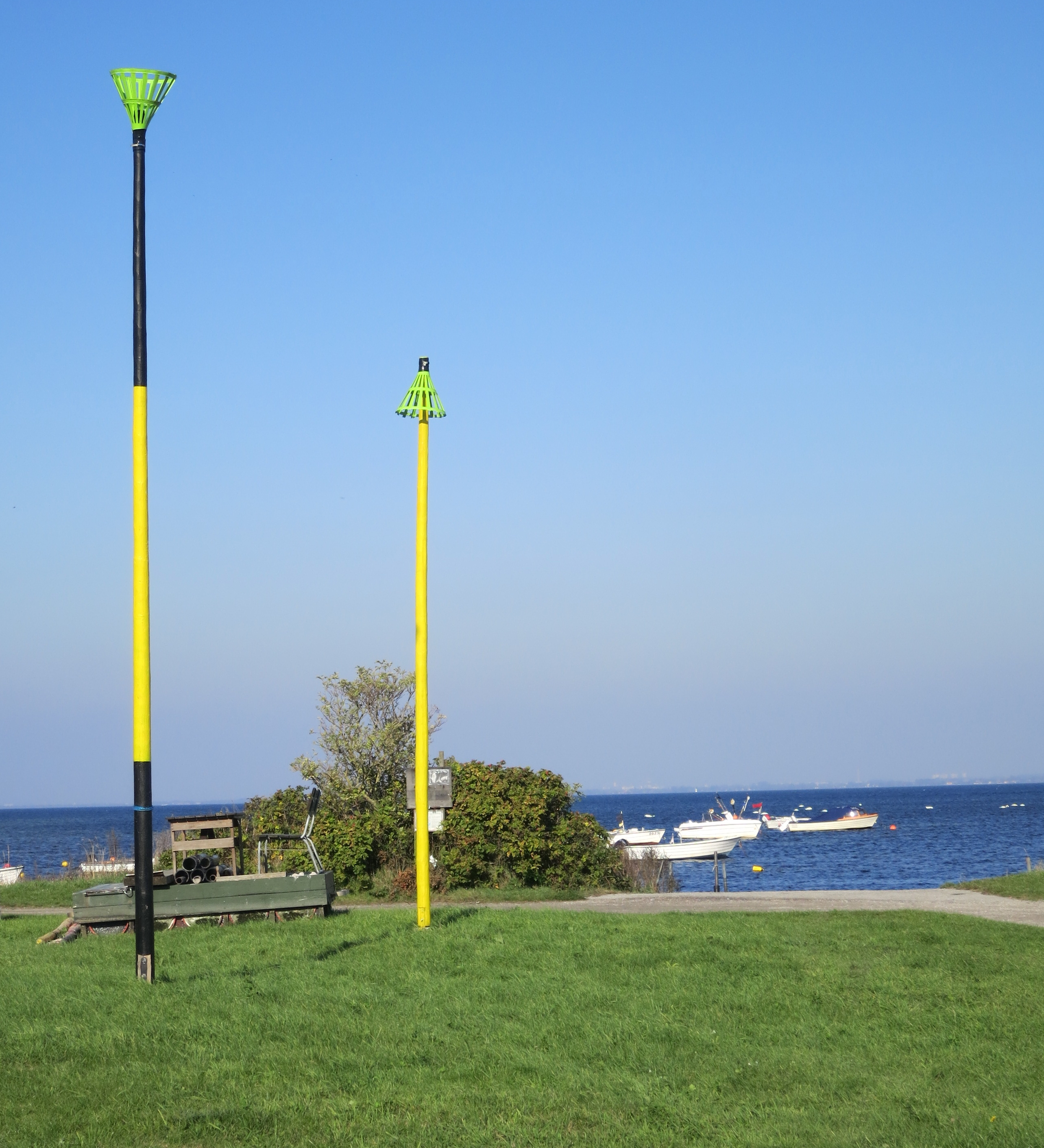 Höll, Skanör